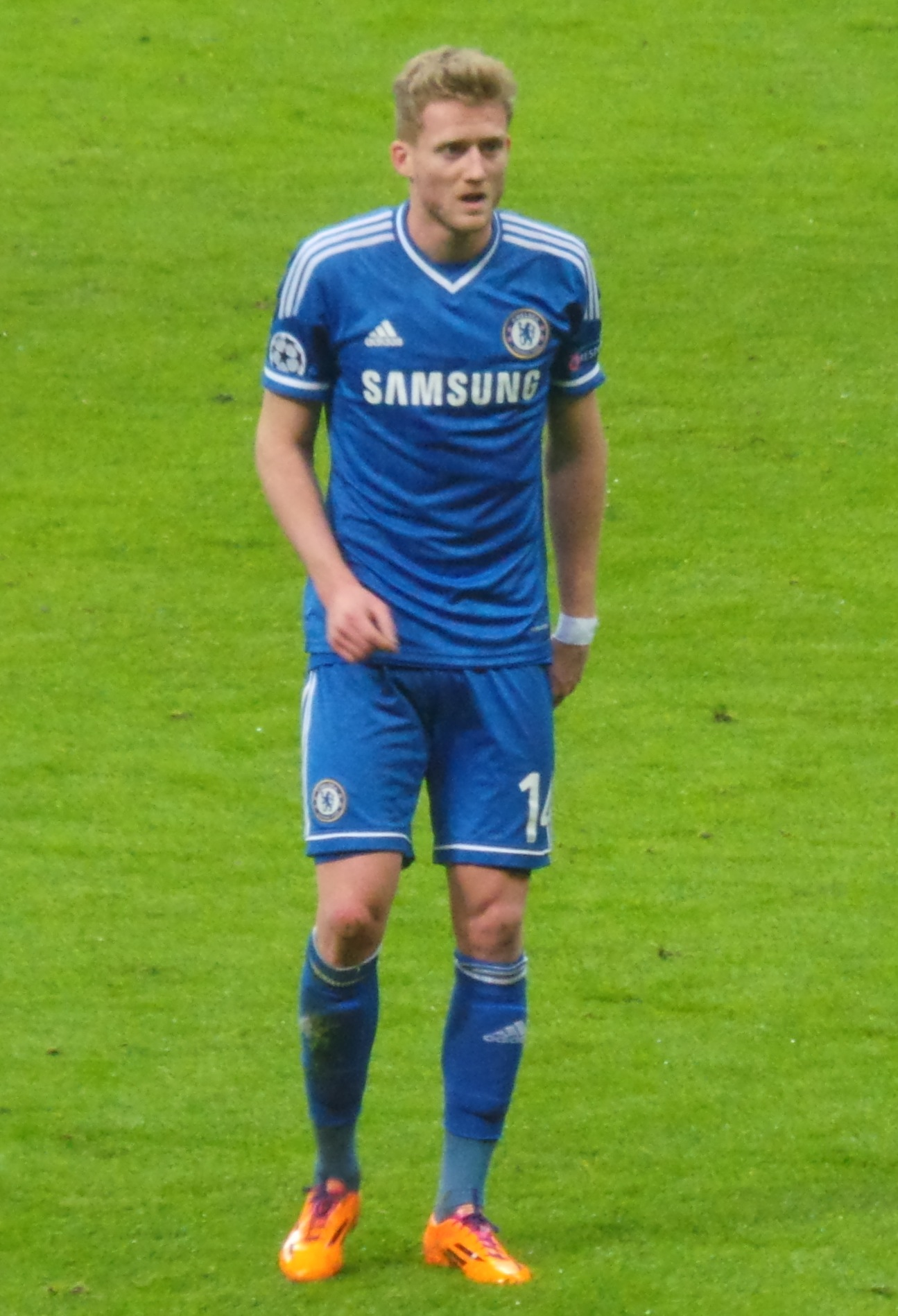 André Schürrle @ Galatasaray